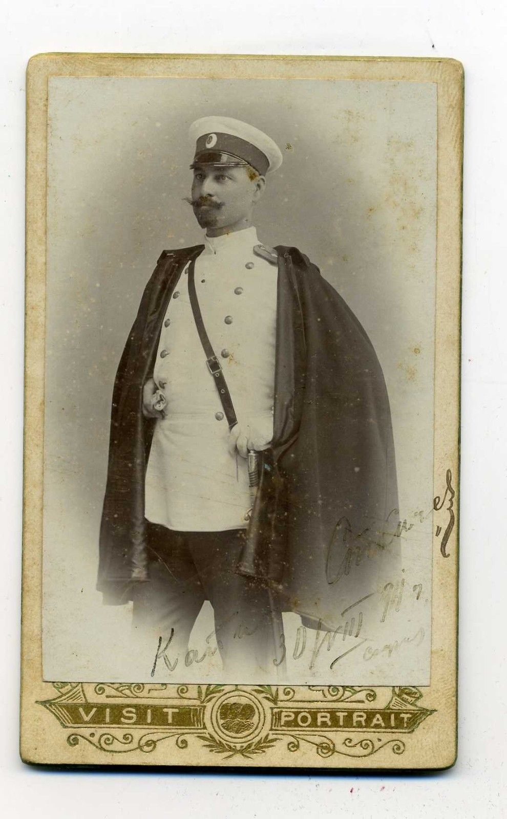 Капитан Иван Стойчев (1867 - 1903)